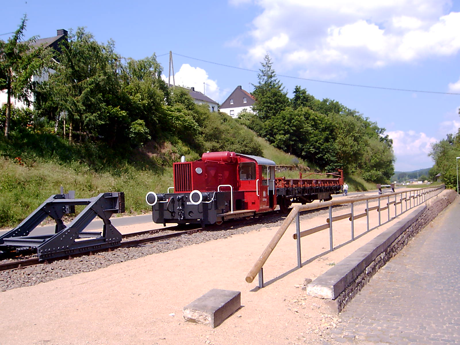 small locomotive in Pronsfeld, Germany; memorial to the former station of the Westeifelbahn / Kleinlok Köf II als Denkmal zur Erinnerung an die frühere Bedeutung des Bahnhofs Pronsfeld für die Westeifelbahn